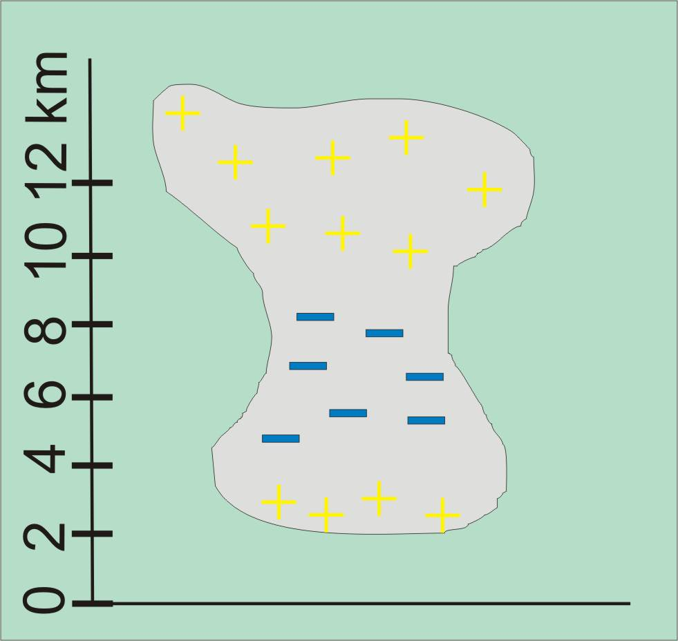 Elektromos töltéseloszlás egy zivatarfelhőben